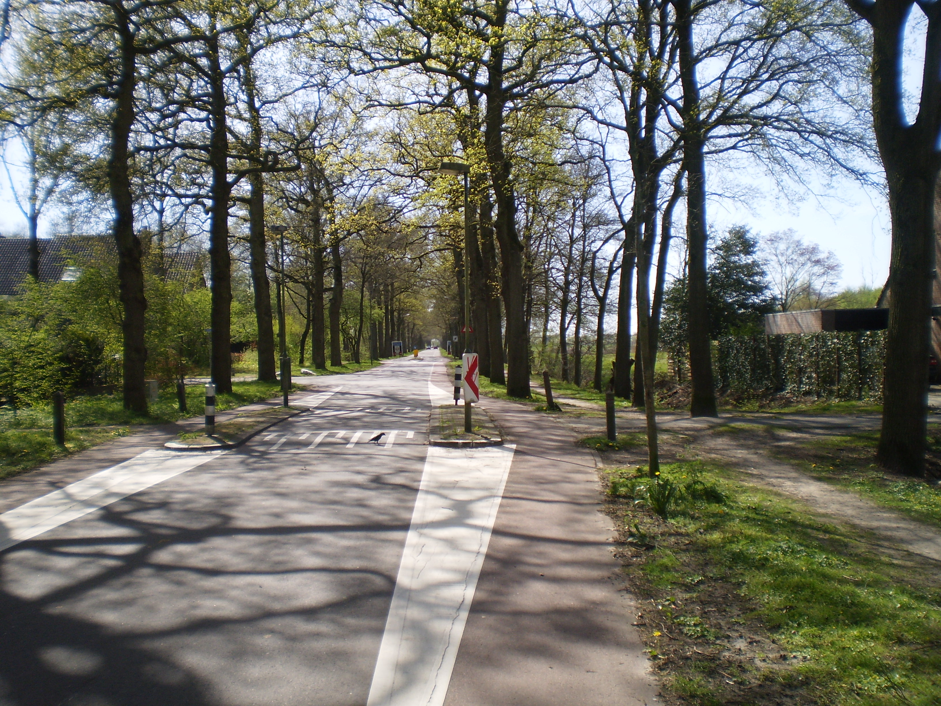 In de richting van het vroegere Kasteel Rijsenburg ter hoogte van straat De Scholeksterrechts